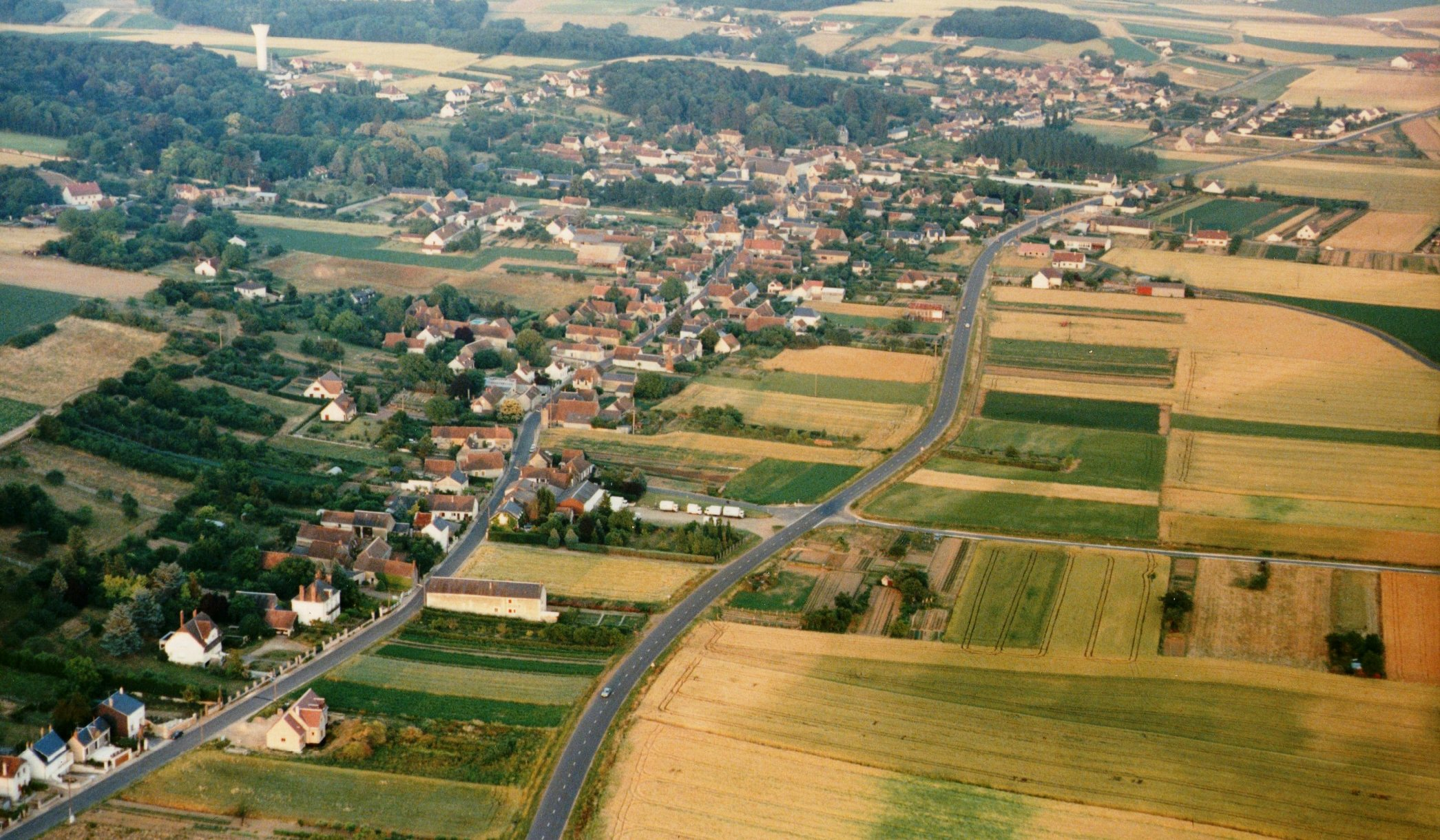 Vue générale de Villiers-sur-Loir (1989)